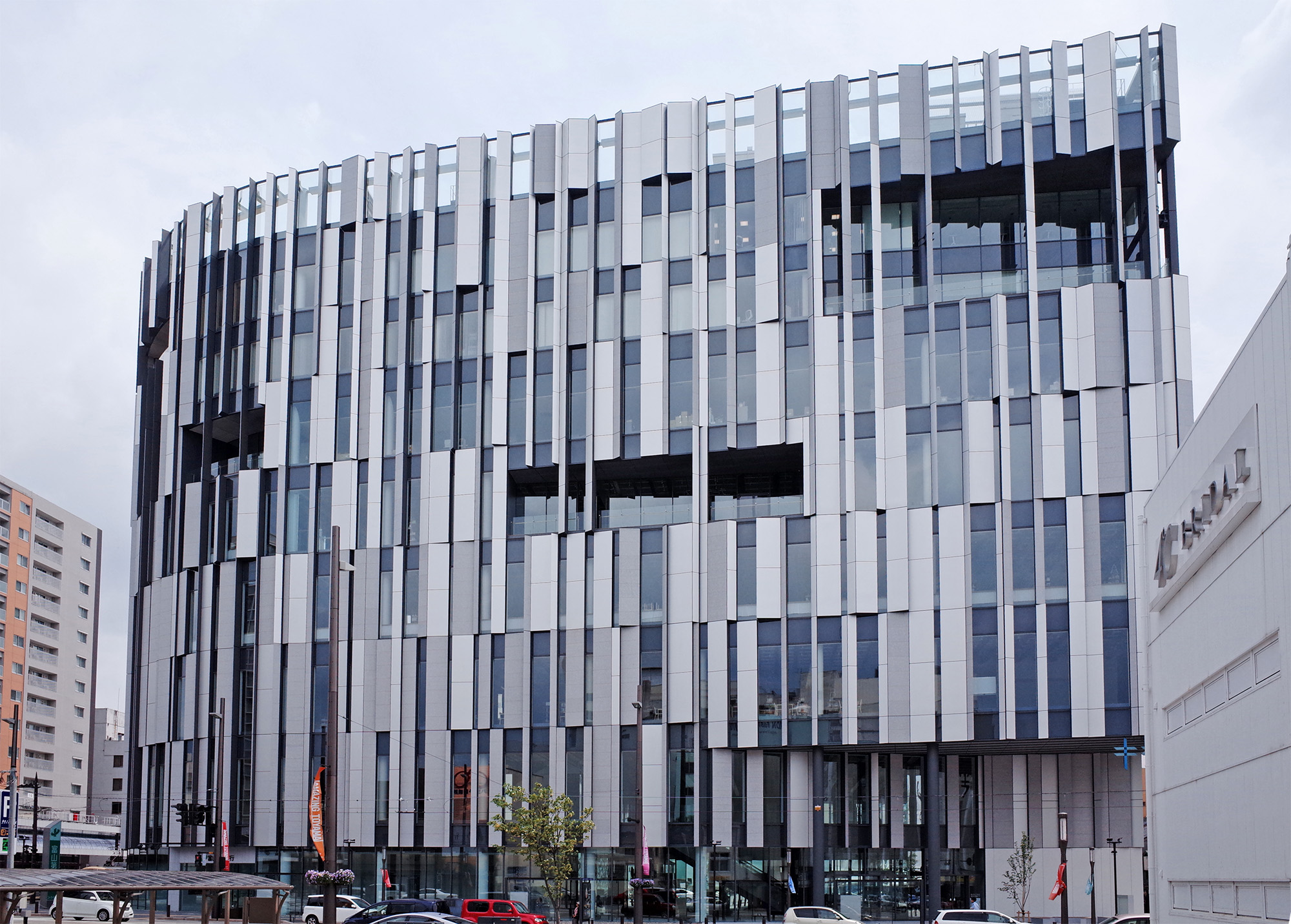 富山市西町5番1号にある複合施設「TOYAMAキラリ」の外観写真